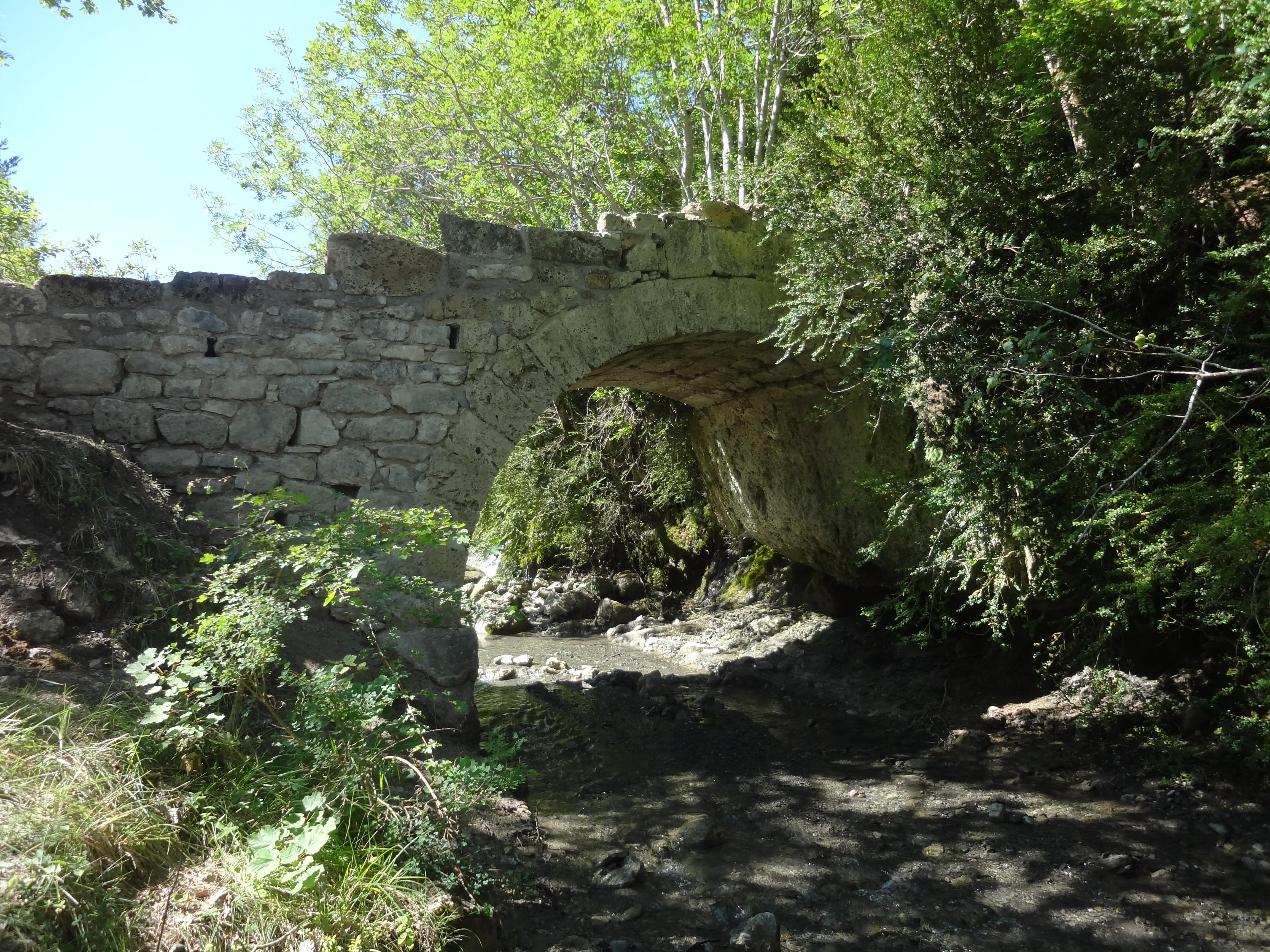 Téléchargée avec Commonist 0.9.1 Pont de La Melle, entre le hameau de la Basse-Melle et Senez, 1104 m d'altitude